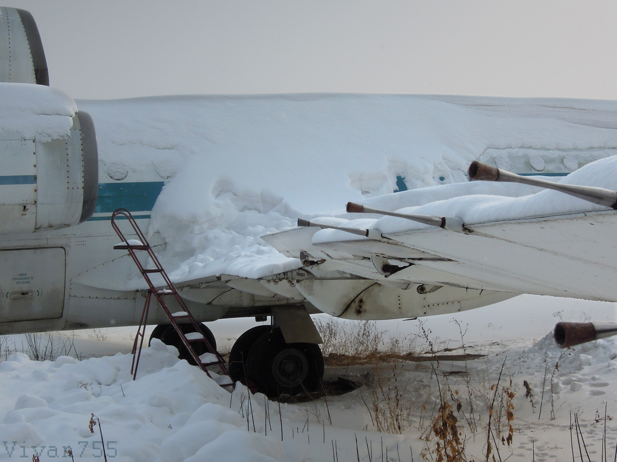 Элерон предсерийного Як-42 СССР-42309 с отклонёнными триммером и сервокомпесантором.